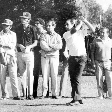 Jorge Soto, golfista argentino. En la foto, Soto usa remera blanca y está ejecutando un swing.